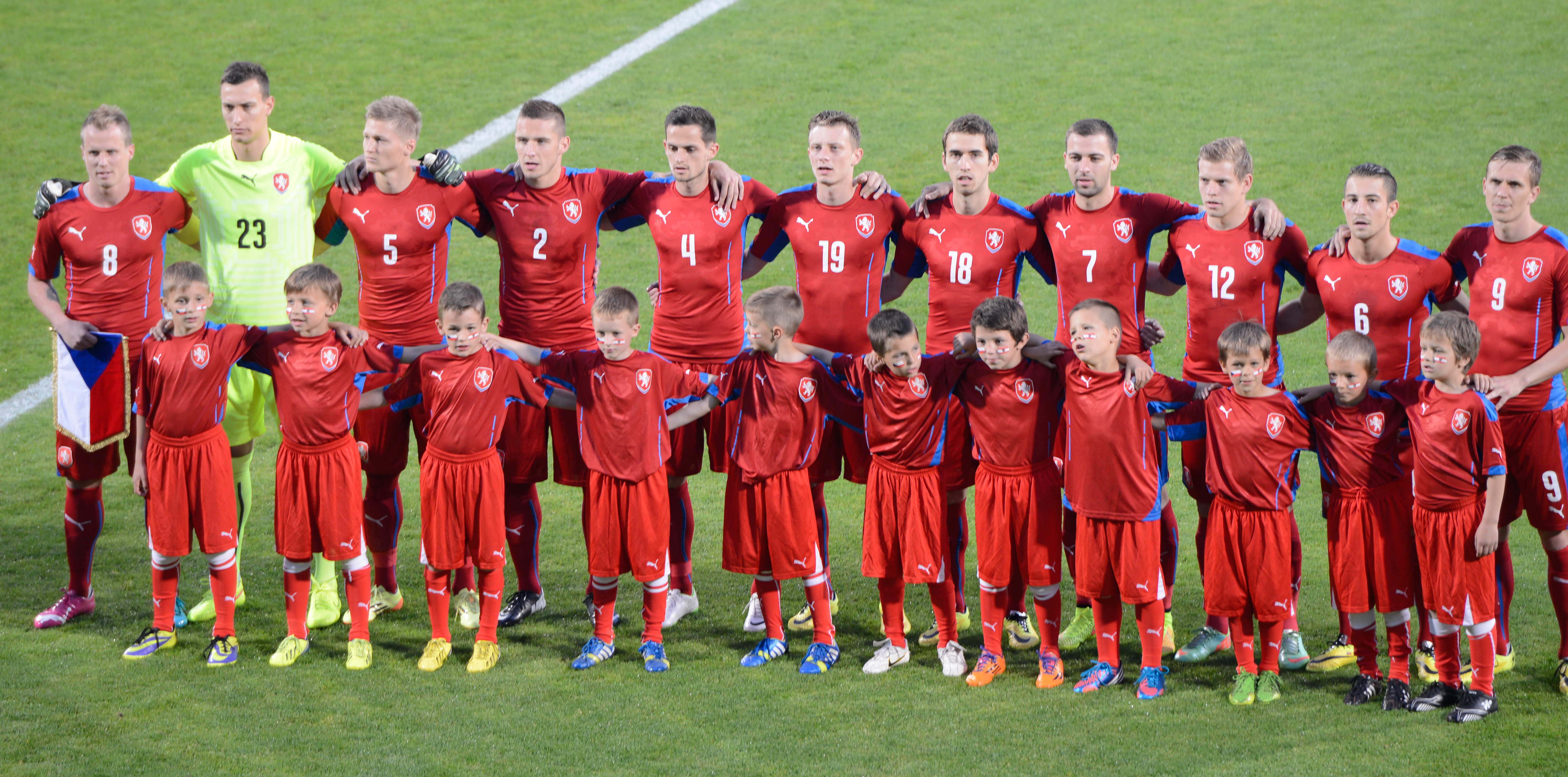 Mezinárodní fotbalový zápas Česko - Rakousko v Olomouce